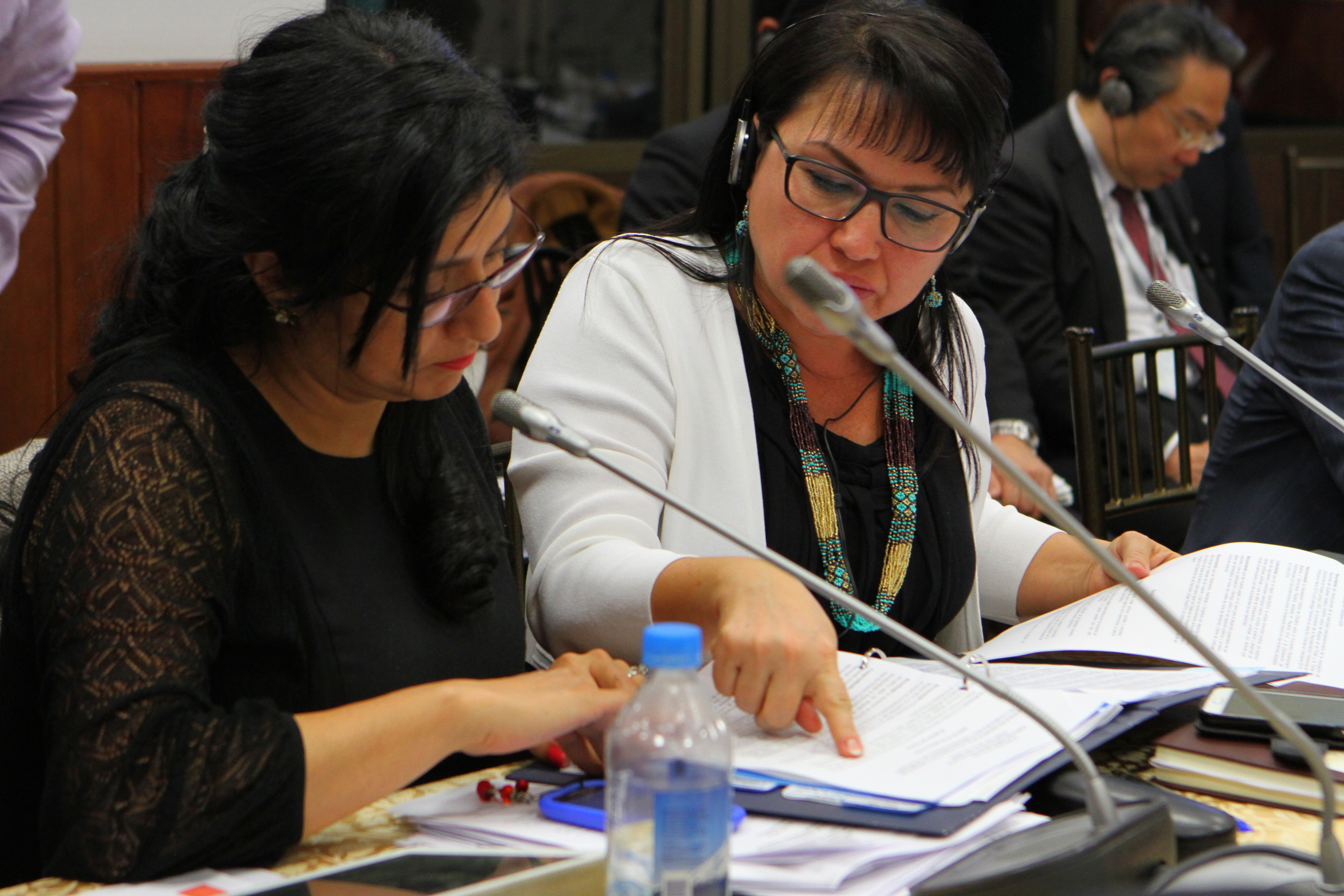 Quito, 13 enero de 2015.- Fernando Bustamante, presidente del Comité de Redacción del 23º Foro Parlamentario Asia Pacífico